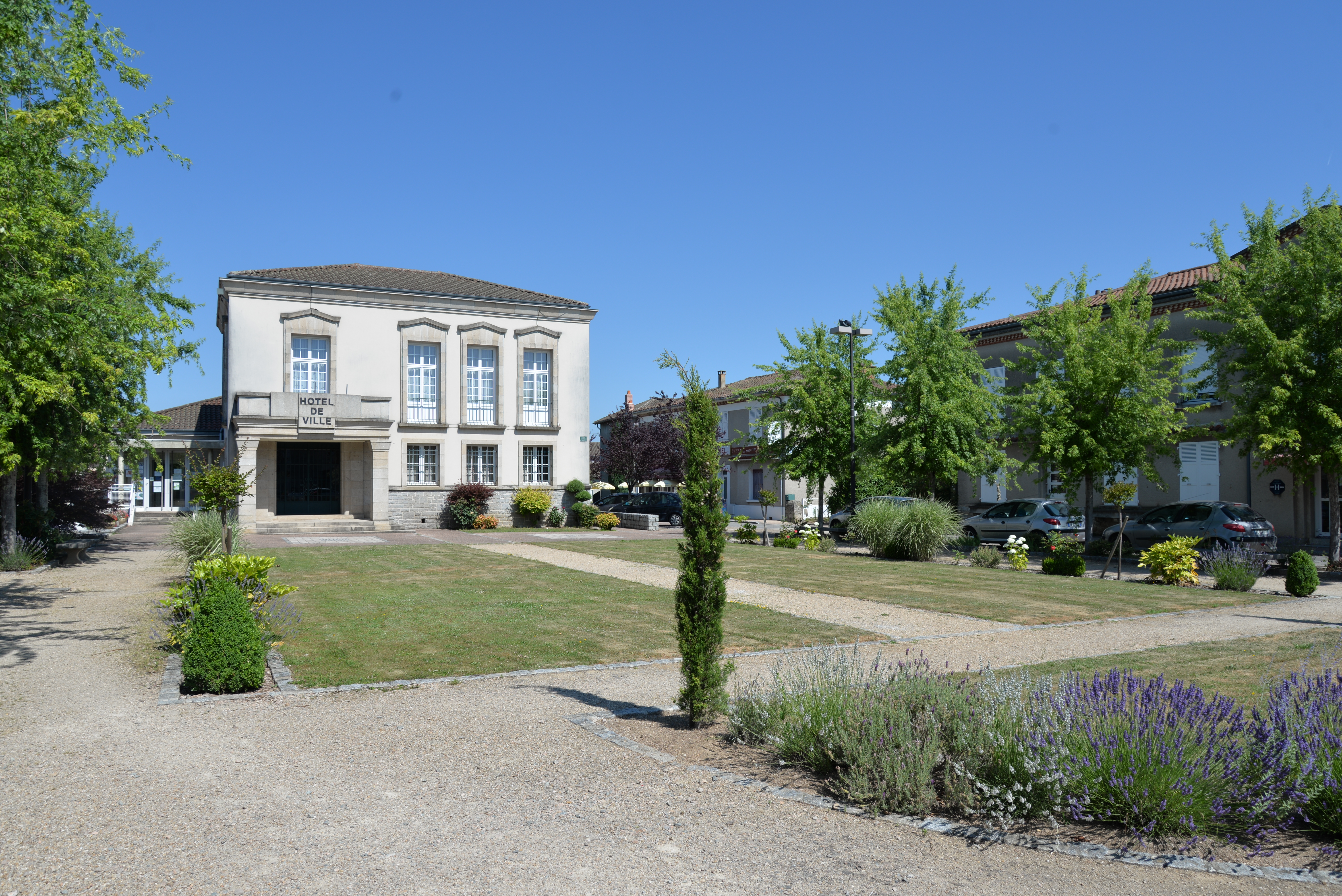 Oradour-sur-Glane